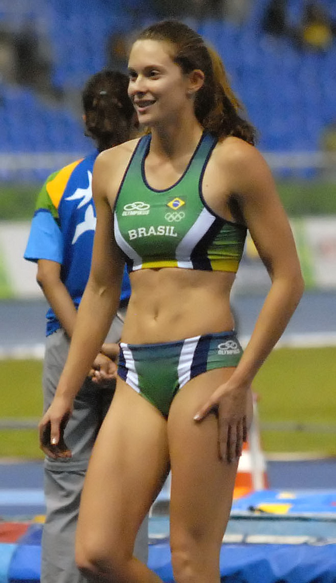 Rio de Janeiro - A paulista Fabiana Murer conquistou a medalha de ouro no salto com vara, ao elevar em 20 centrímetros o antigo recorde pan-americano de 4,40 metros